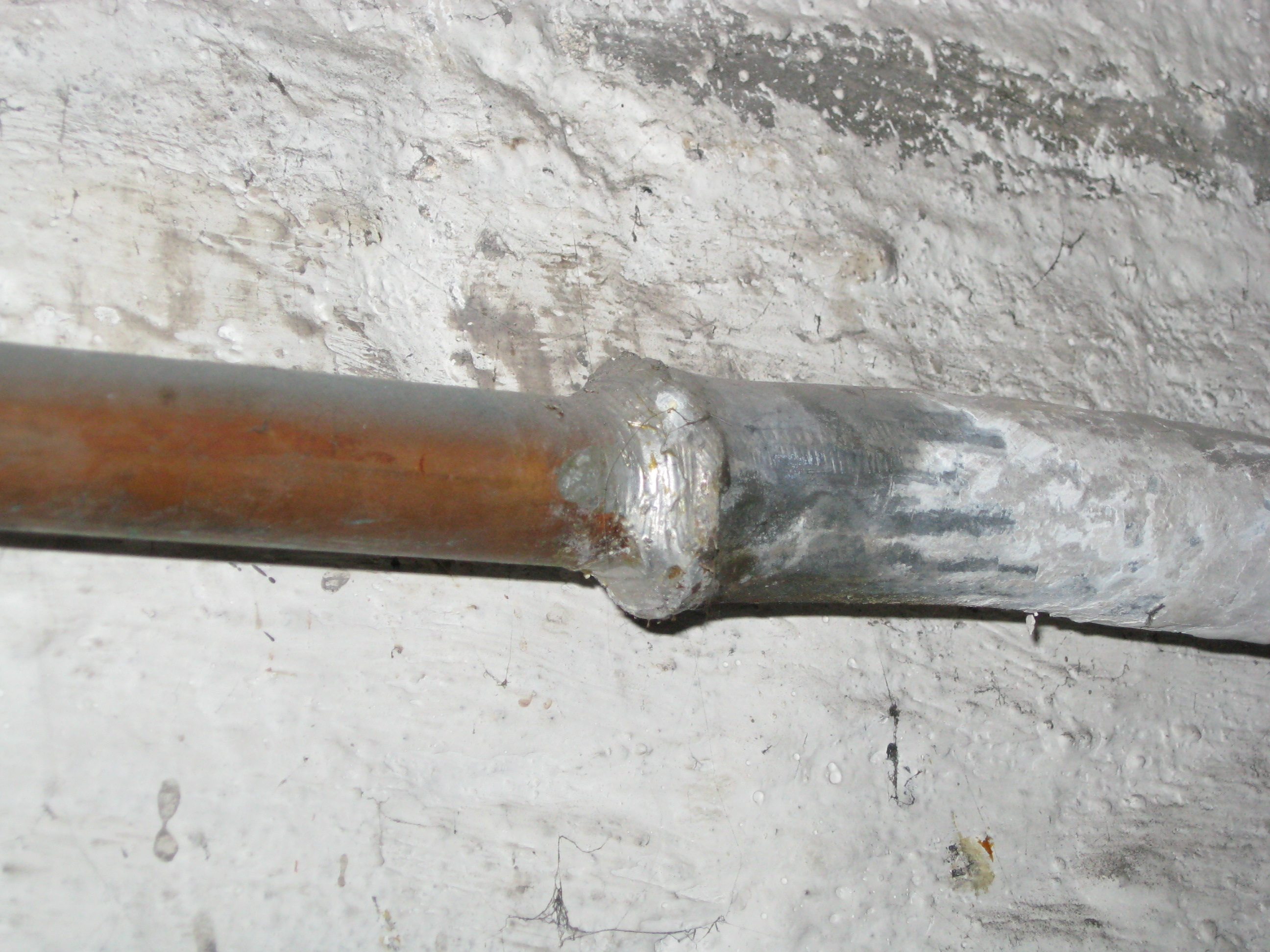 Trinkwasserleitung aus Blei in einer Hausinstallation